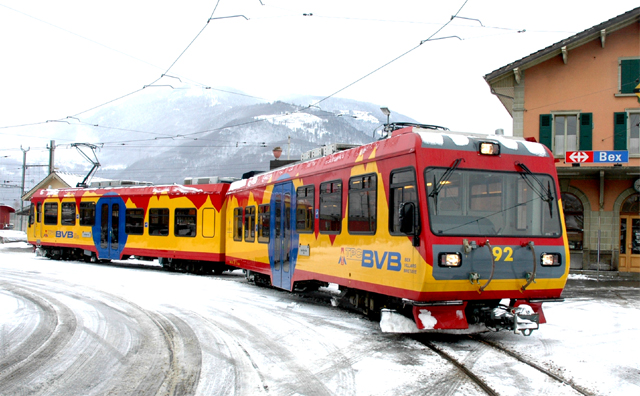 Chemin de fer Bex-Villars-Bretaye (BVB) treinstel Beh 4/8 (bj. 2001) 92 te Bex.